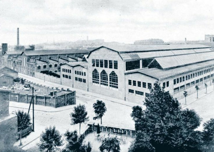 Budapest. A kőbányai Ganz-gyár 1920-ban